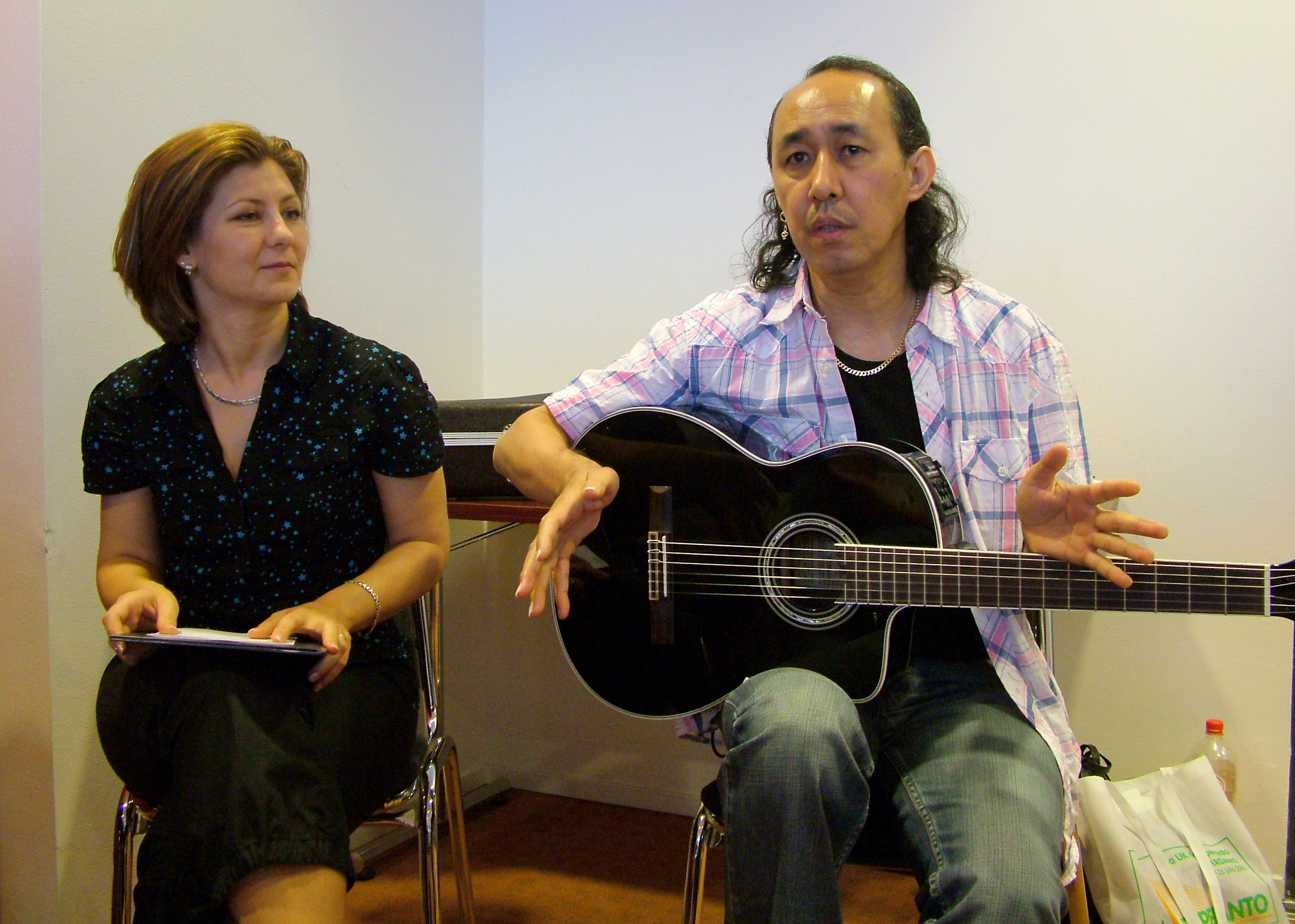 Universala Kongreso de Esperanto, Roterdamo 2008. Auxtora duonhoro en la Libroservo, kun Jxomart kaj Natasxa.